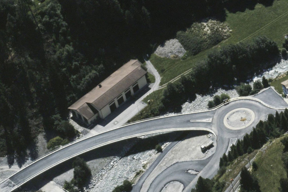 Zentrale Tiefencastel der Alubla-Landwasser-Kraftwerke